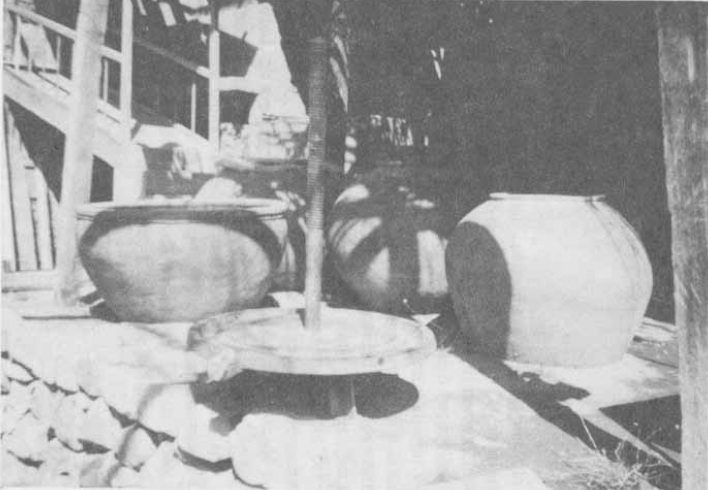 Antiguas Botijas para Vino Valle del Limari Hacienda Rio Grande(Tulahuen) de los Pizarro del Pozo.